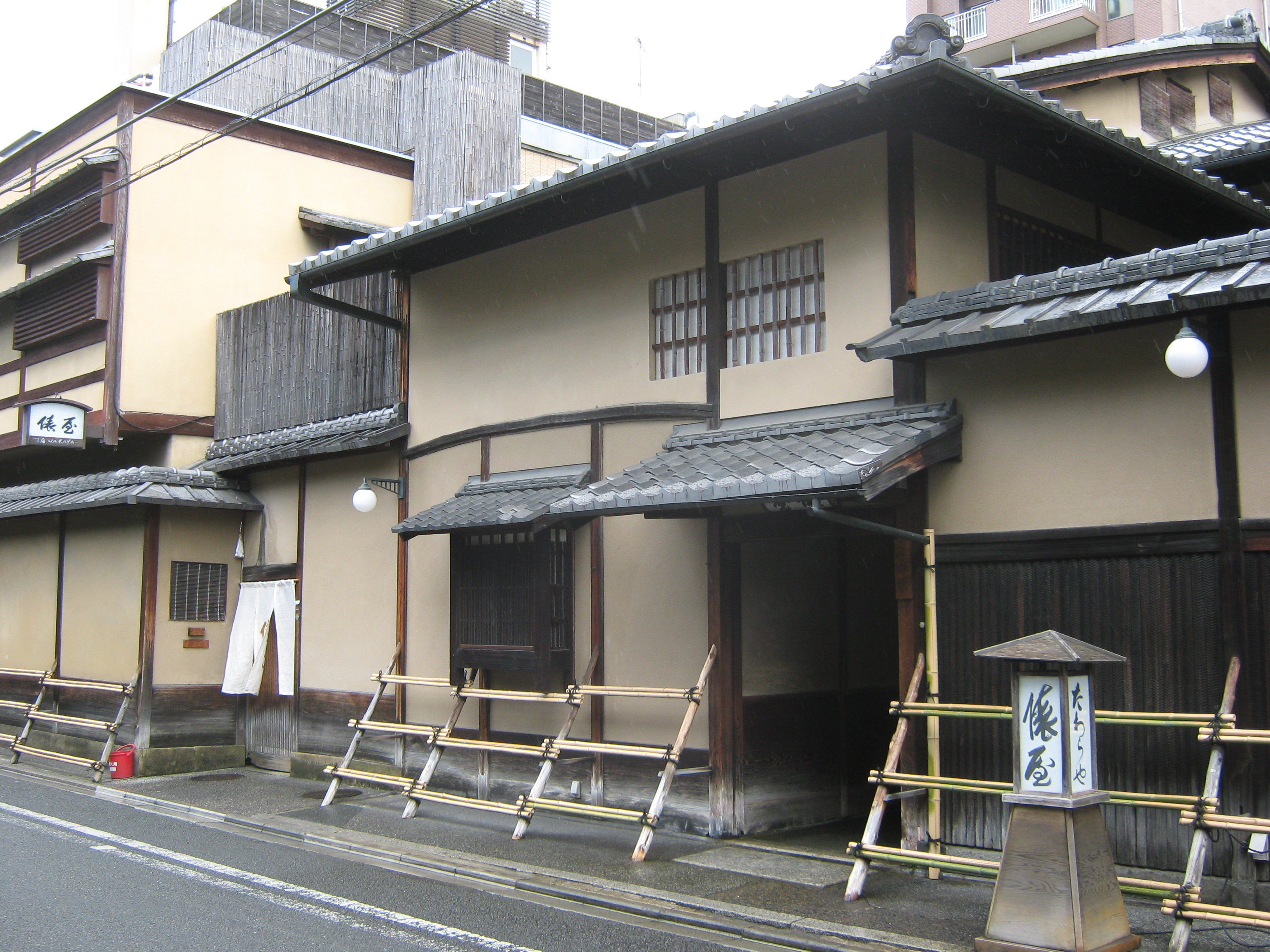 京都最古の旅館「俵屋旅館」